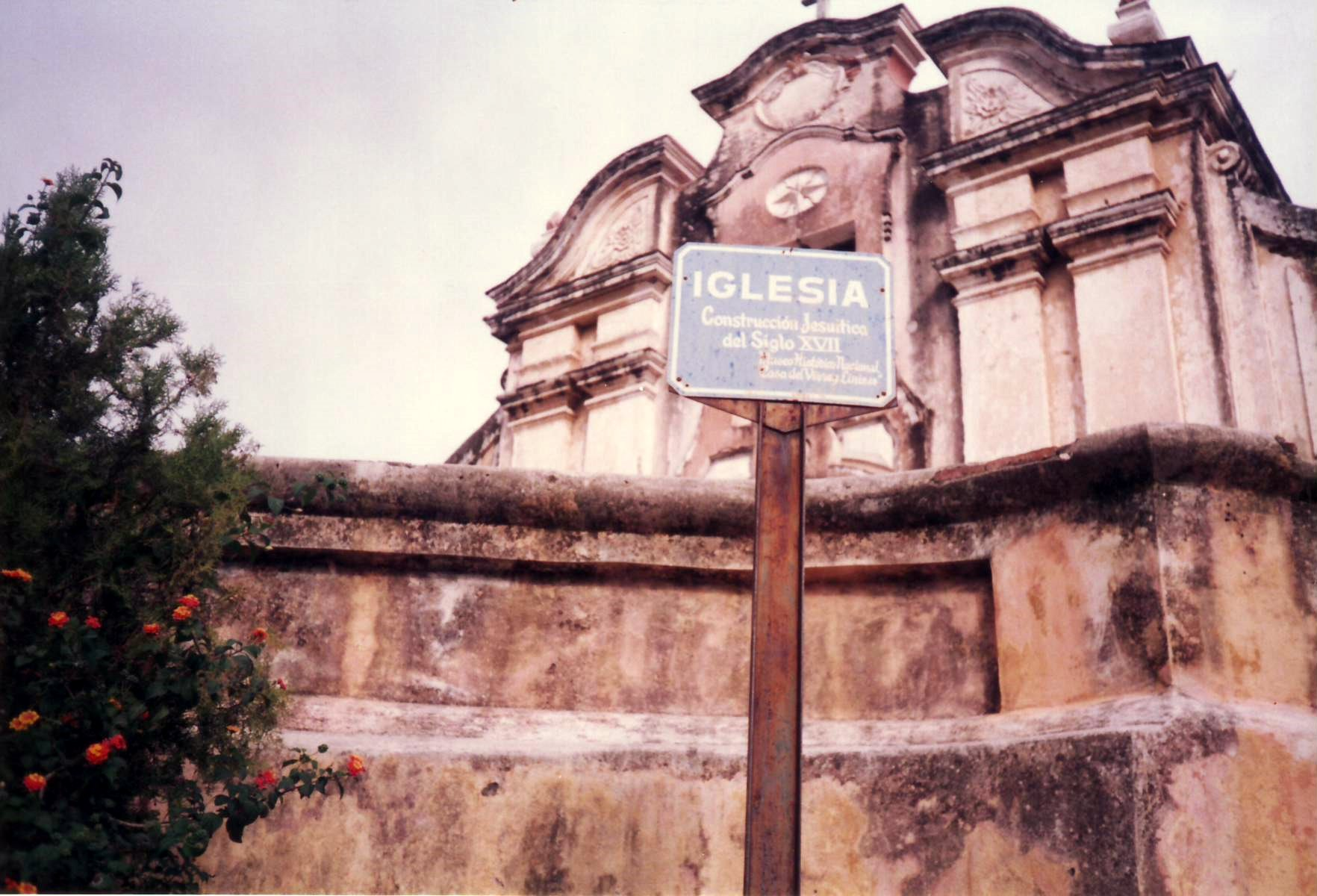 Iglesia de construcción Jesuita del Siglo XVII, residencia del Virrey Liniers